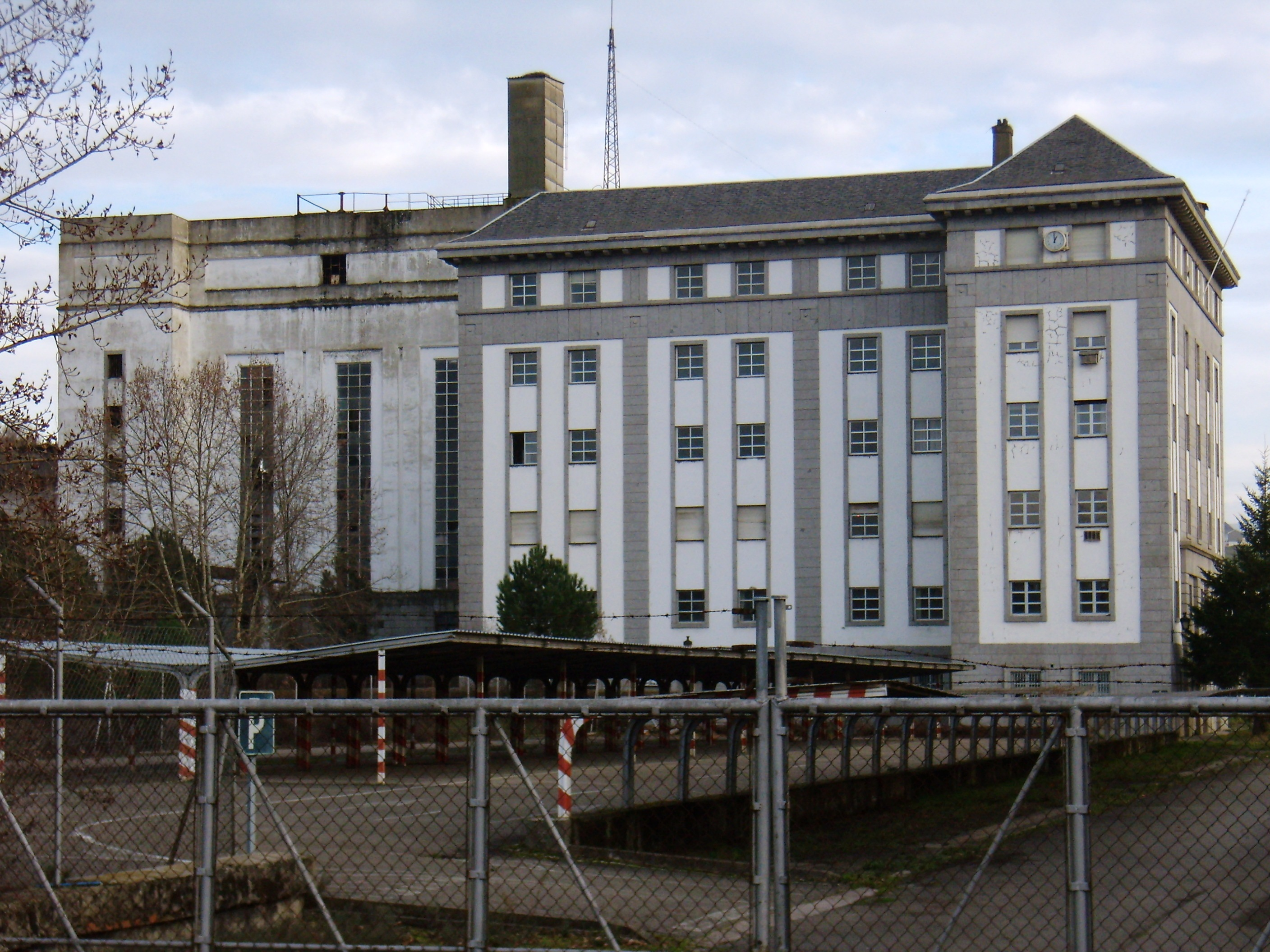 Central Térmica de Compostilla I (actualmente desmantelada y sede del CIUDEN) (Ponferrada, El Bierzo, León, España)